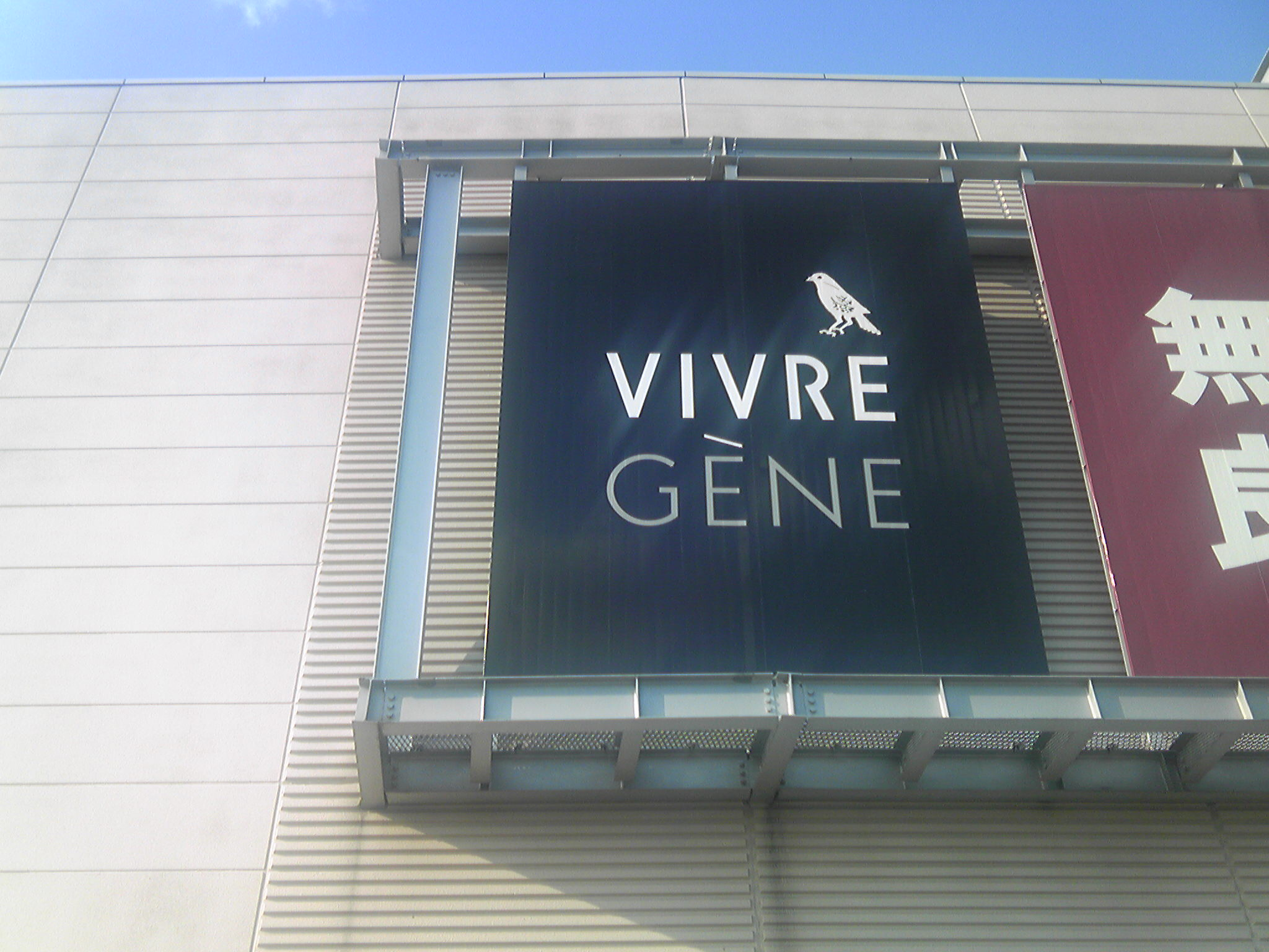 ビブレジーン福岡（福岡県糟屋郡粕屋町）の看板